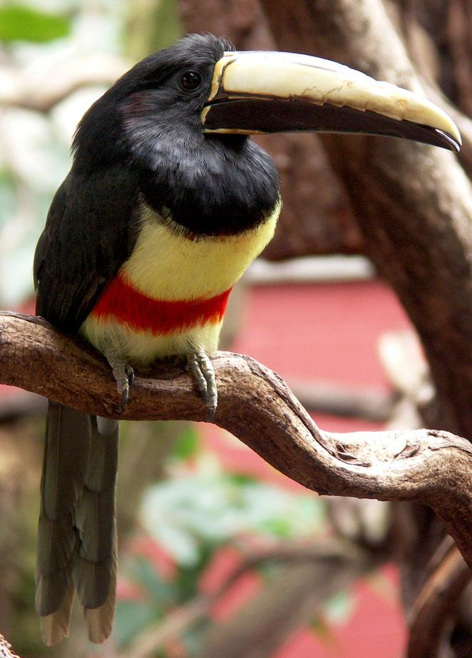 Black-necked aracari (Pteroglossus aracari)